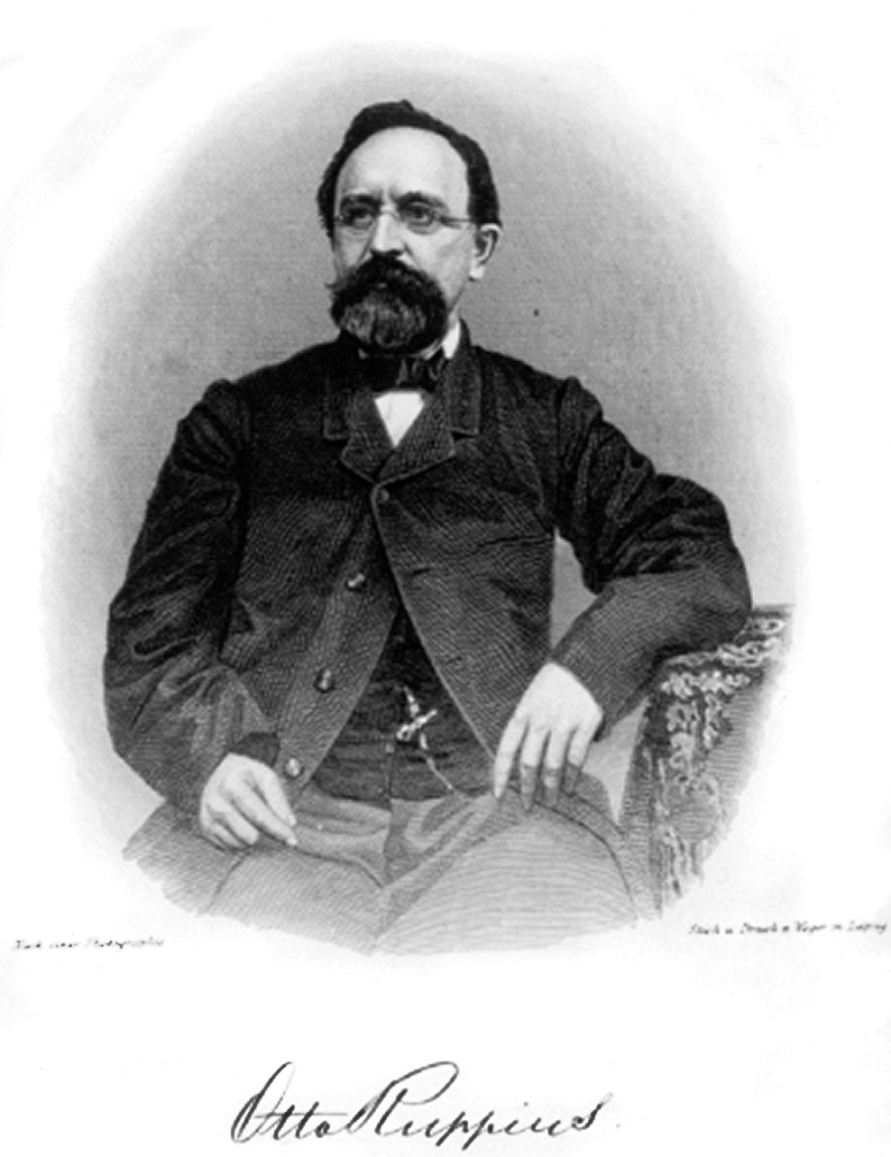 Porträt: Otto Ruppius, Stahlstich von August Weger (1823-1892) nach einer Photographie